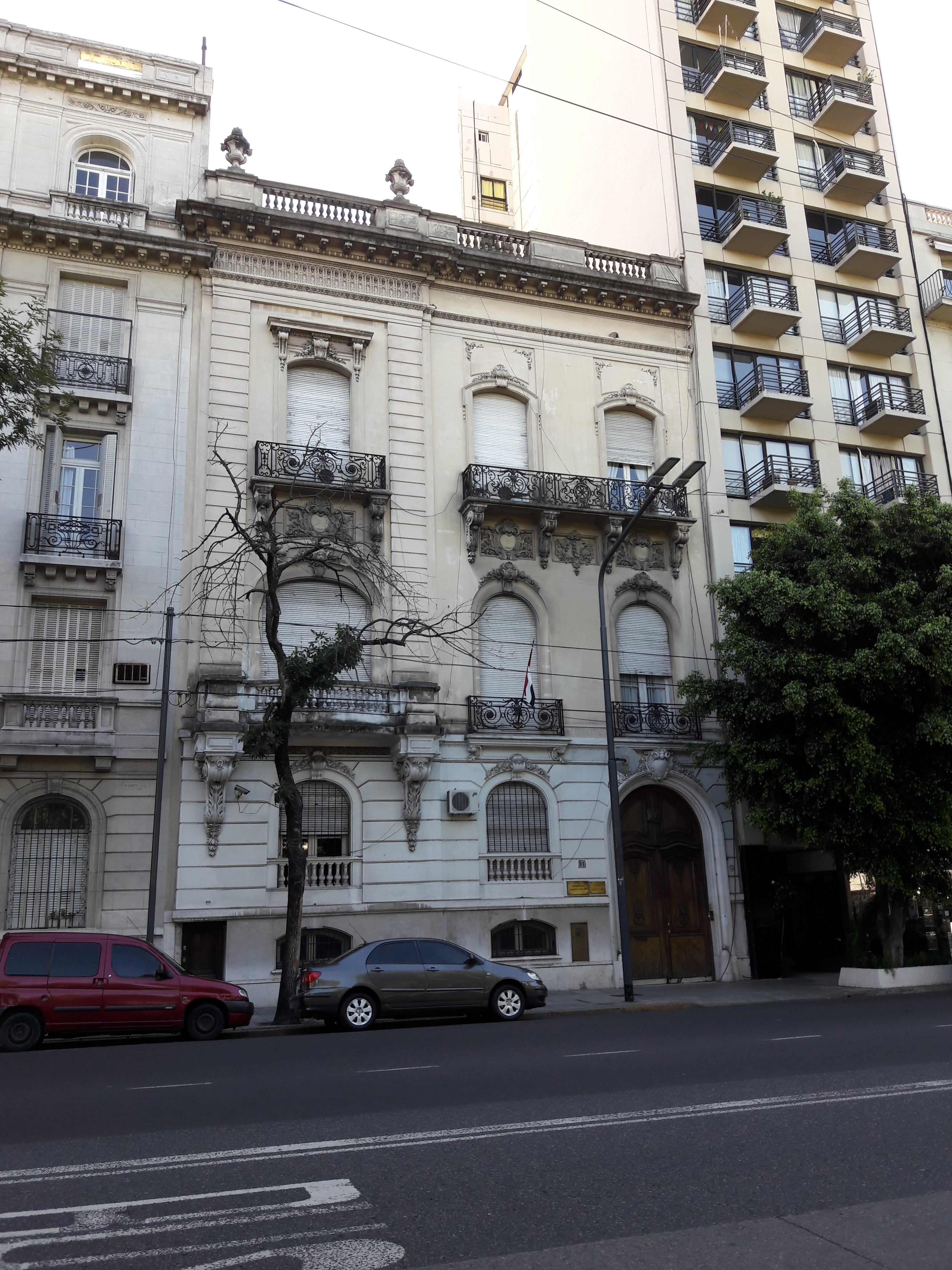 Embajada de Siria, Recoleta, Buenos Aires, Argentina.